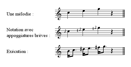 Description : Appoggiature brève Source : Personnelle Licence : GFDL